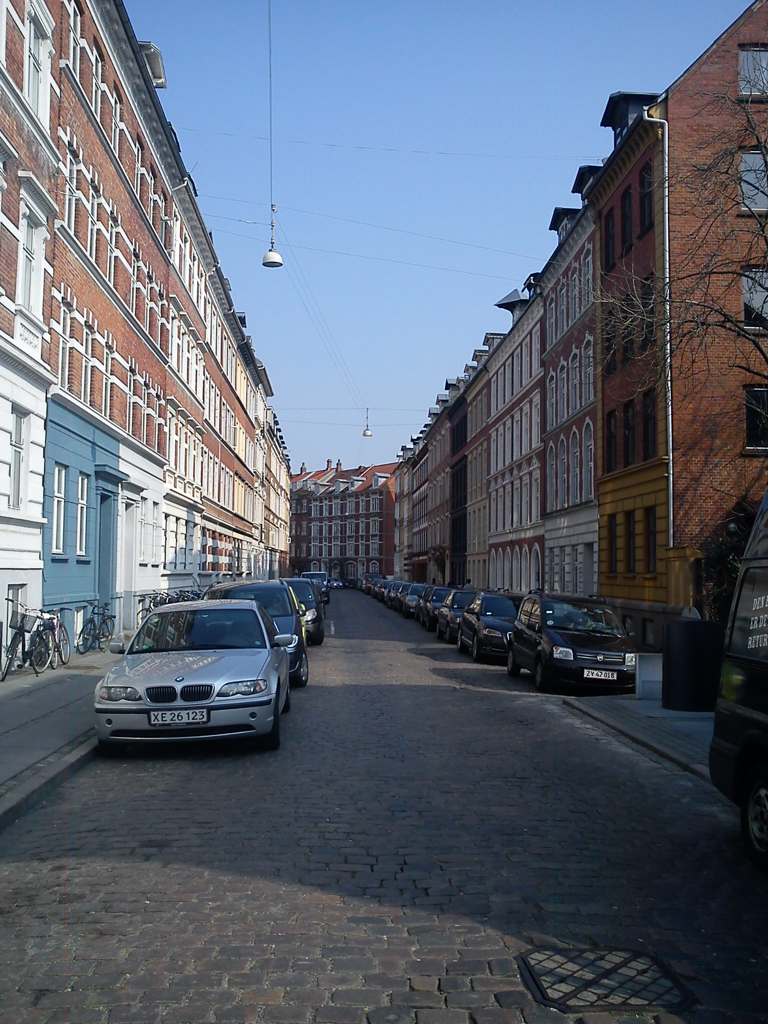 Sølystgade